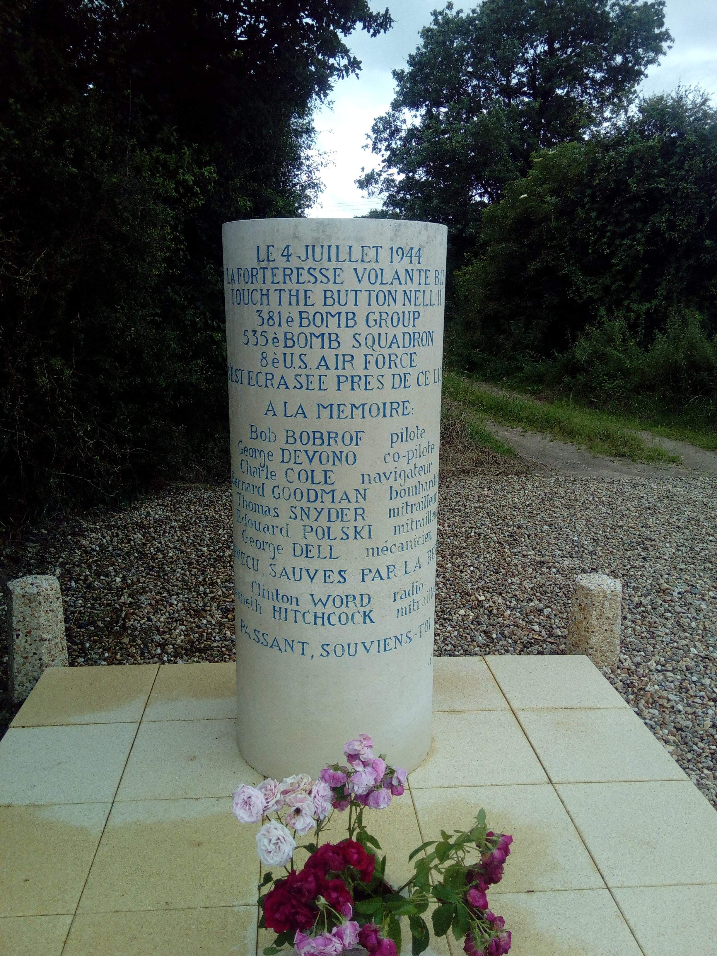 Le monument en hommage au crash d'un B17 le 4 juillet 1944 à Persac